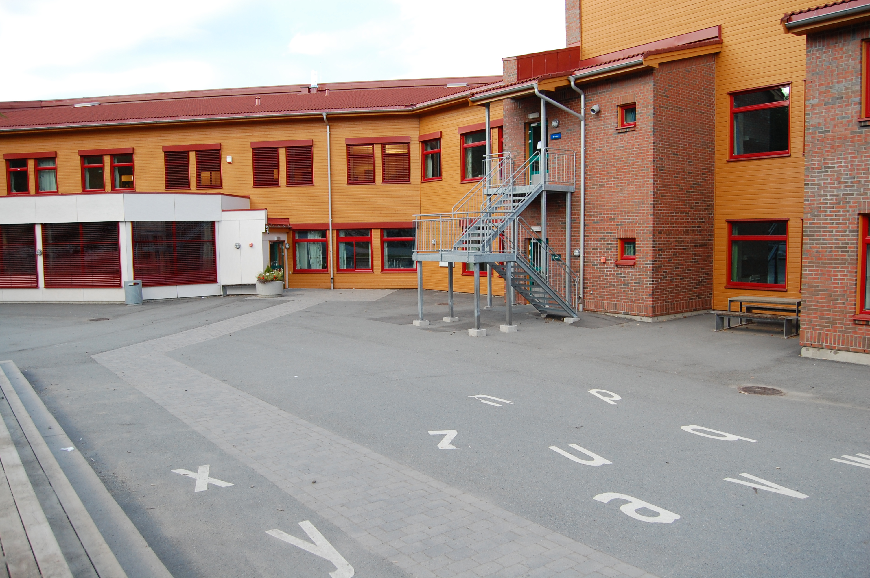 Frydenlund barneskole